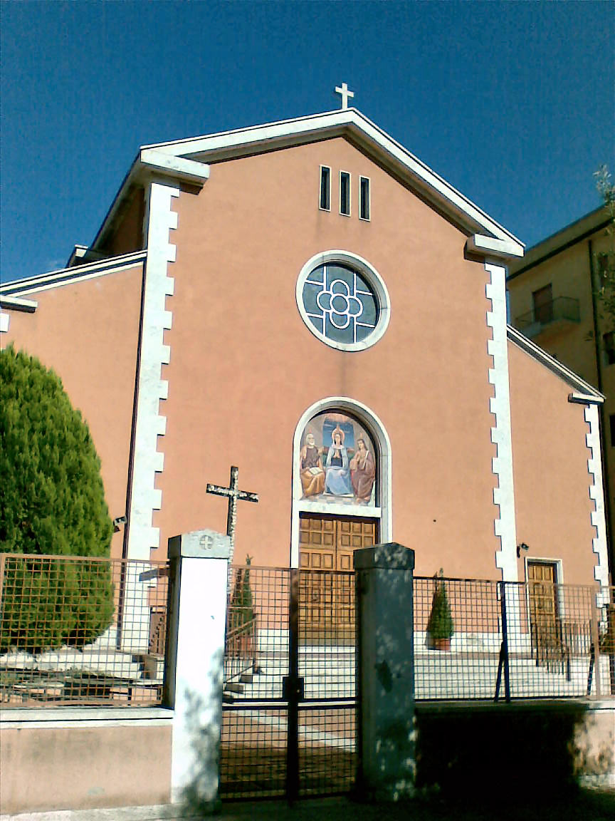 La Chiesa di Santa Maria di Costantinopoli a Benevento